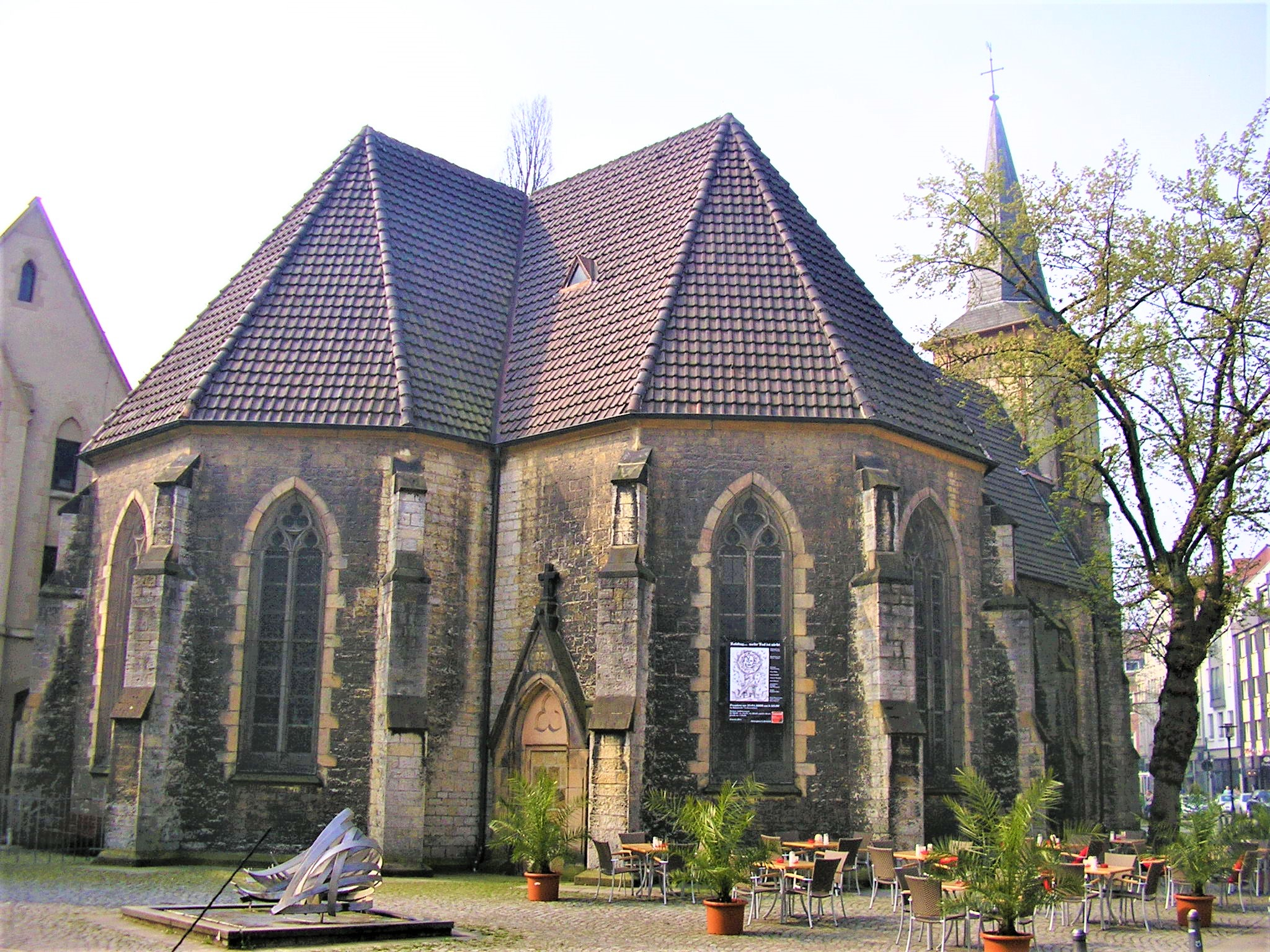 Süsterkirche (Bielefeld)